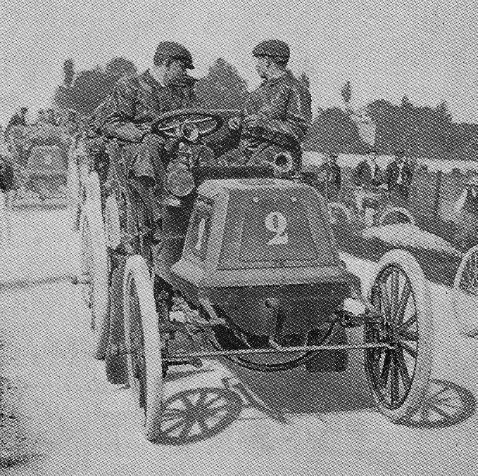 Paris-Amsterdam-Paris 1898 (Vitesse, 5 au 13 juillet 1898), Gilles Hourgières, voiture [2] Panhard-Levassor au départ de Villiers-sur-Marne, le 5 juillet 1898.